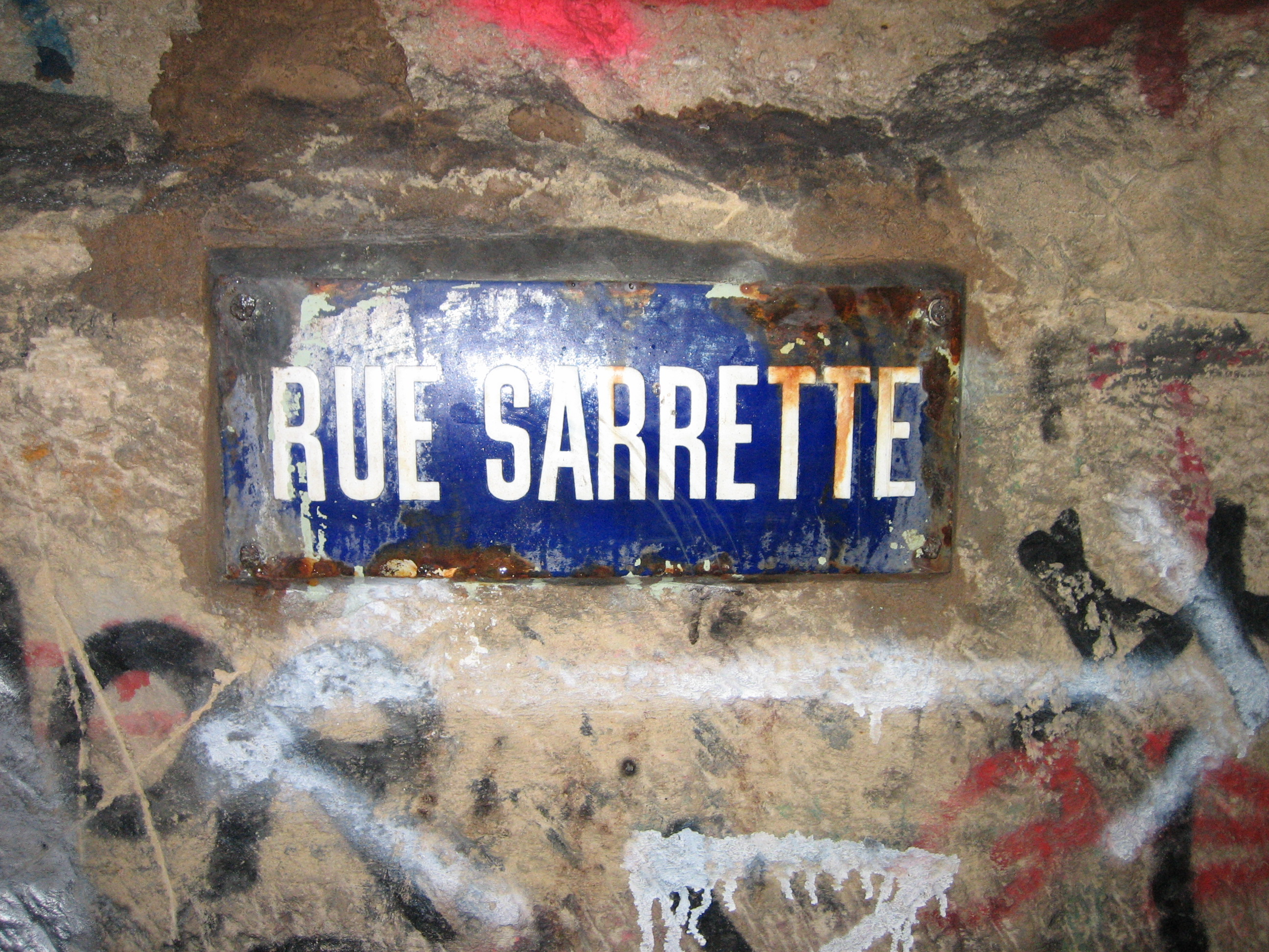 Promenade dans les catacombes de Paris, près du Charlety